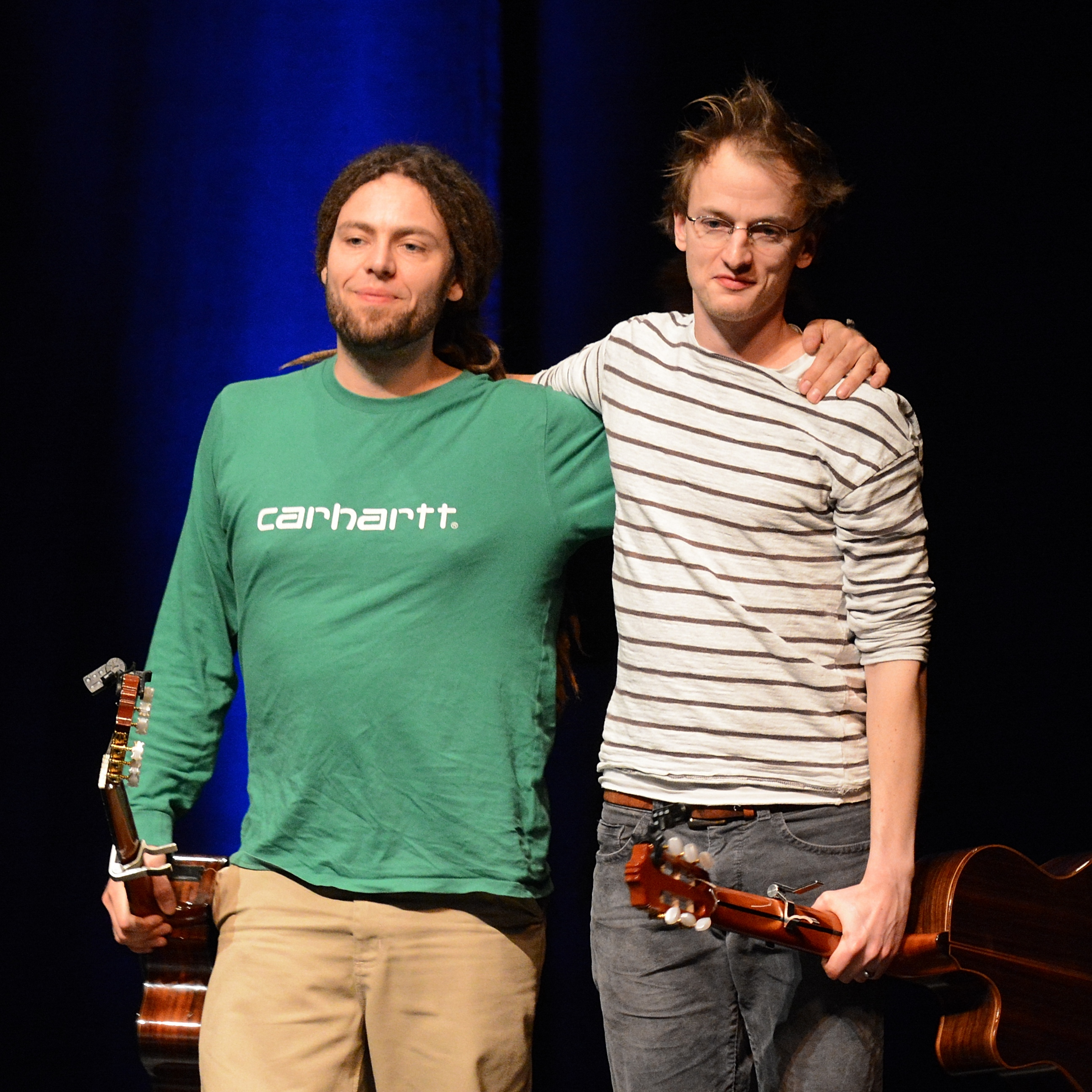 Simon & Jan bei einer Vorrundenvorstellung von Das Schwarze Schaf 2014 in Wesel.